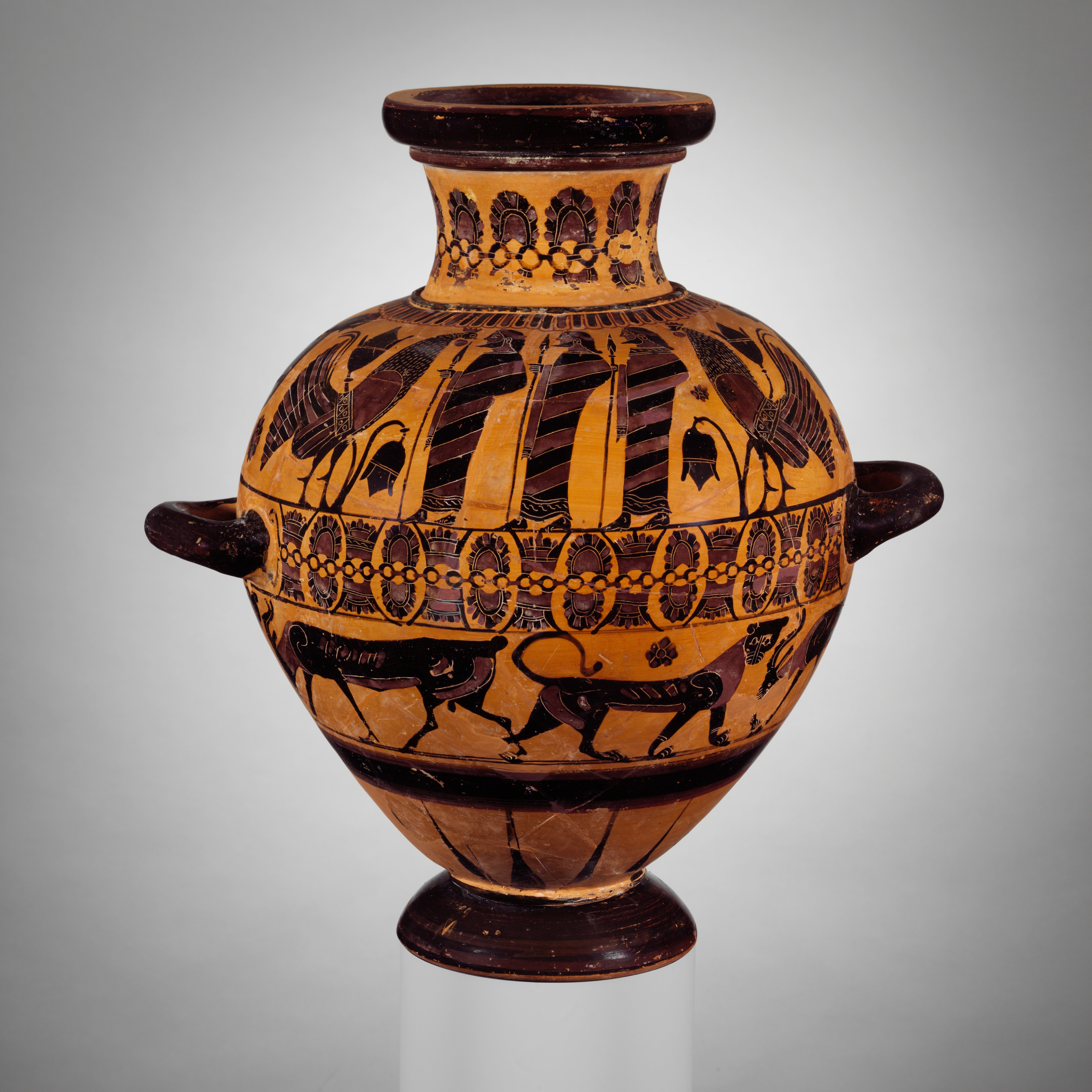 Greek, Attic; Hydria; Vases